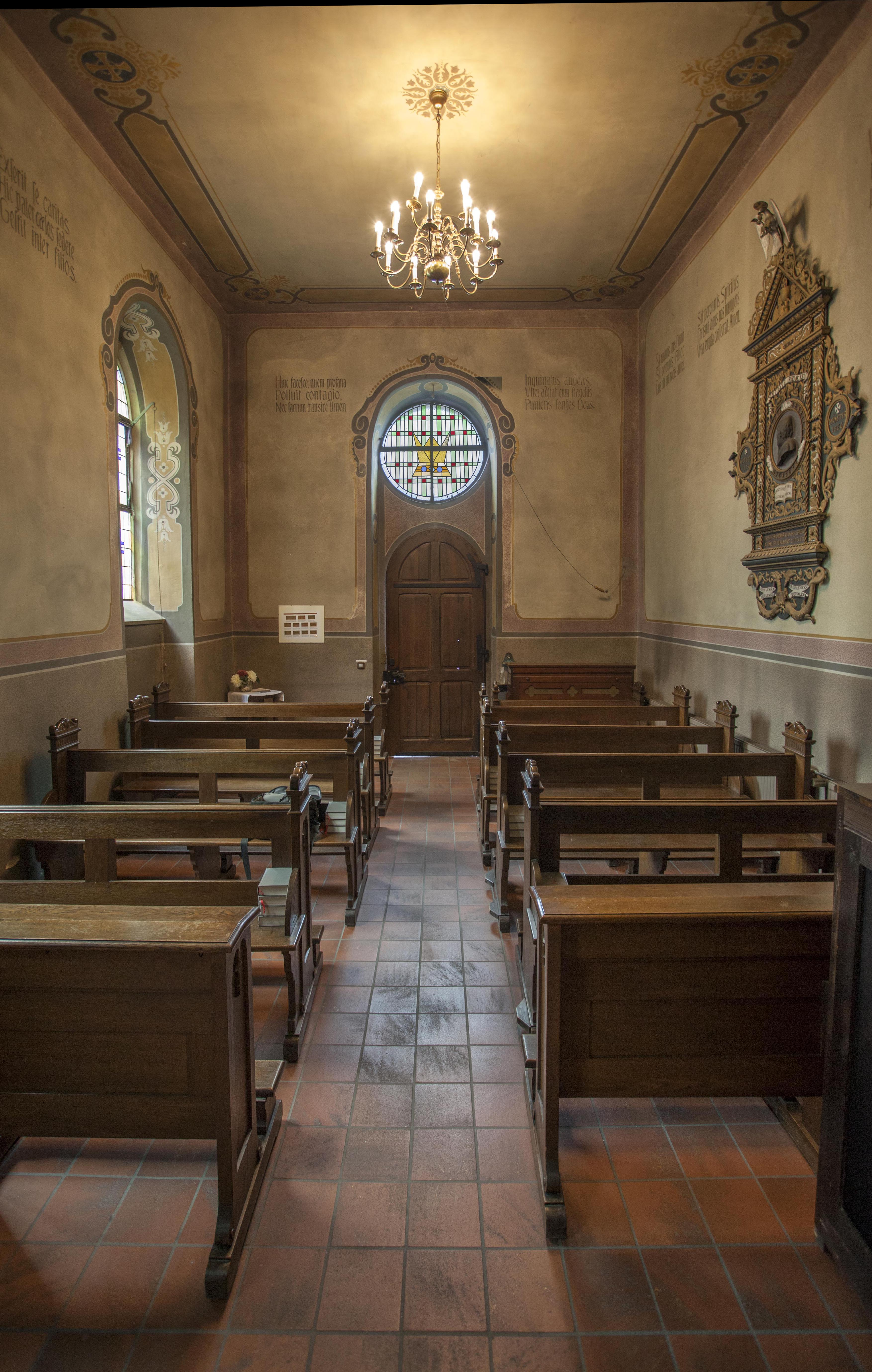 Bönkerskapelle Rheine - Blick nach Westen (persp.korrigiert)